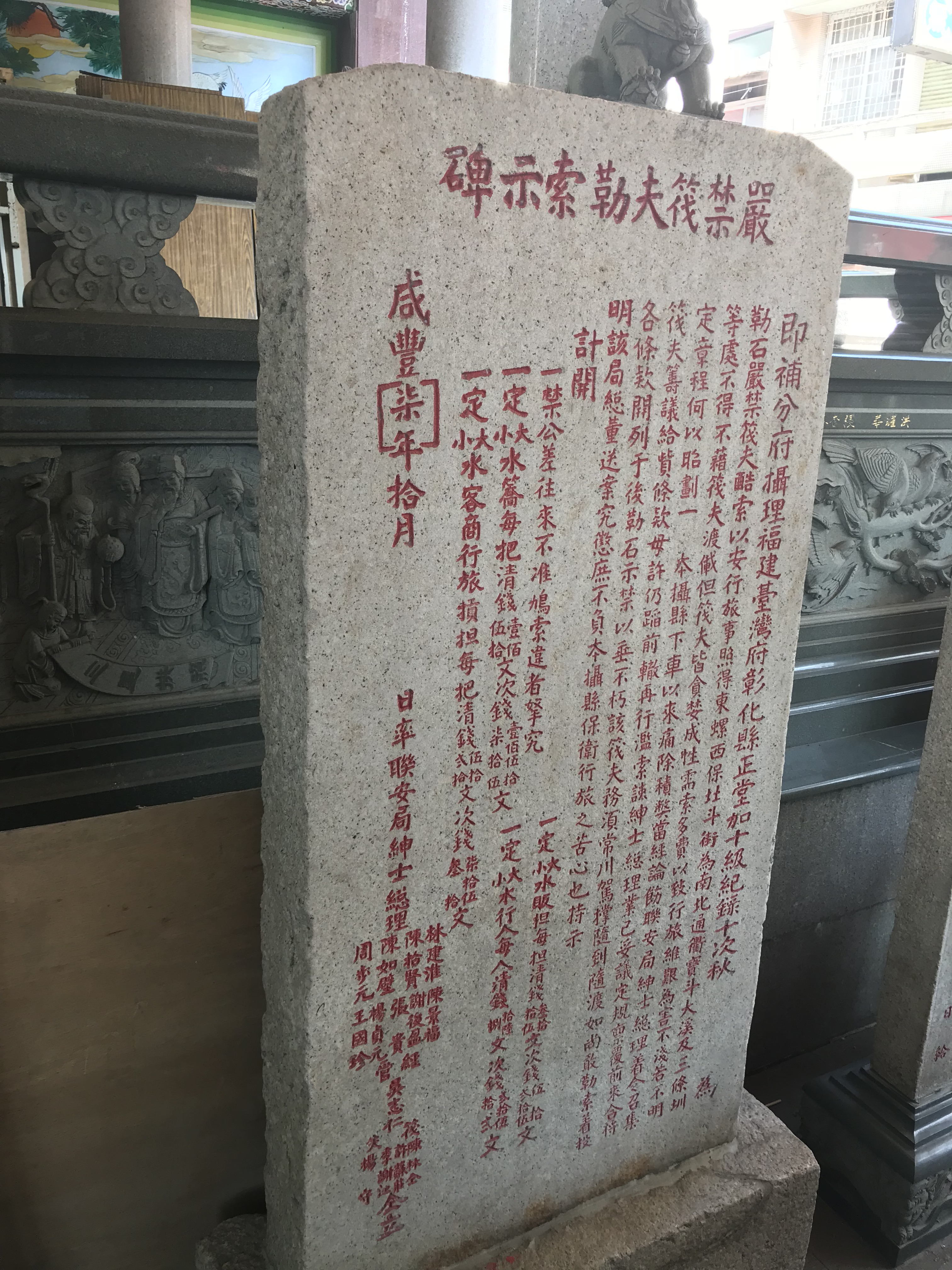 北斗奠安宮嚴禁筏夫勒索示碑